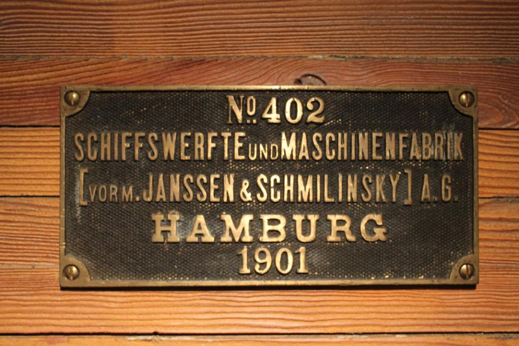 Bau Nummer 402 für den Schleppdampfer Caroline der Werft Janssen & Schmilinsky